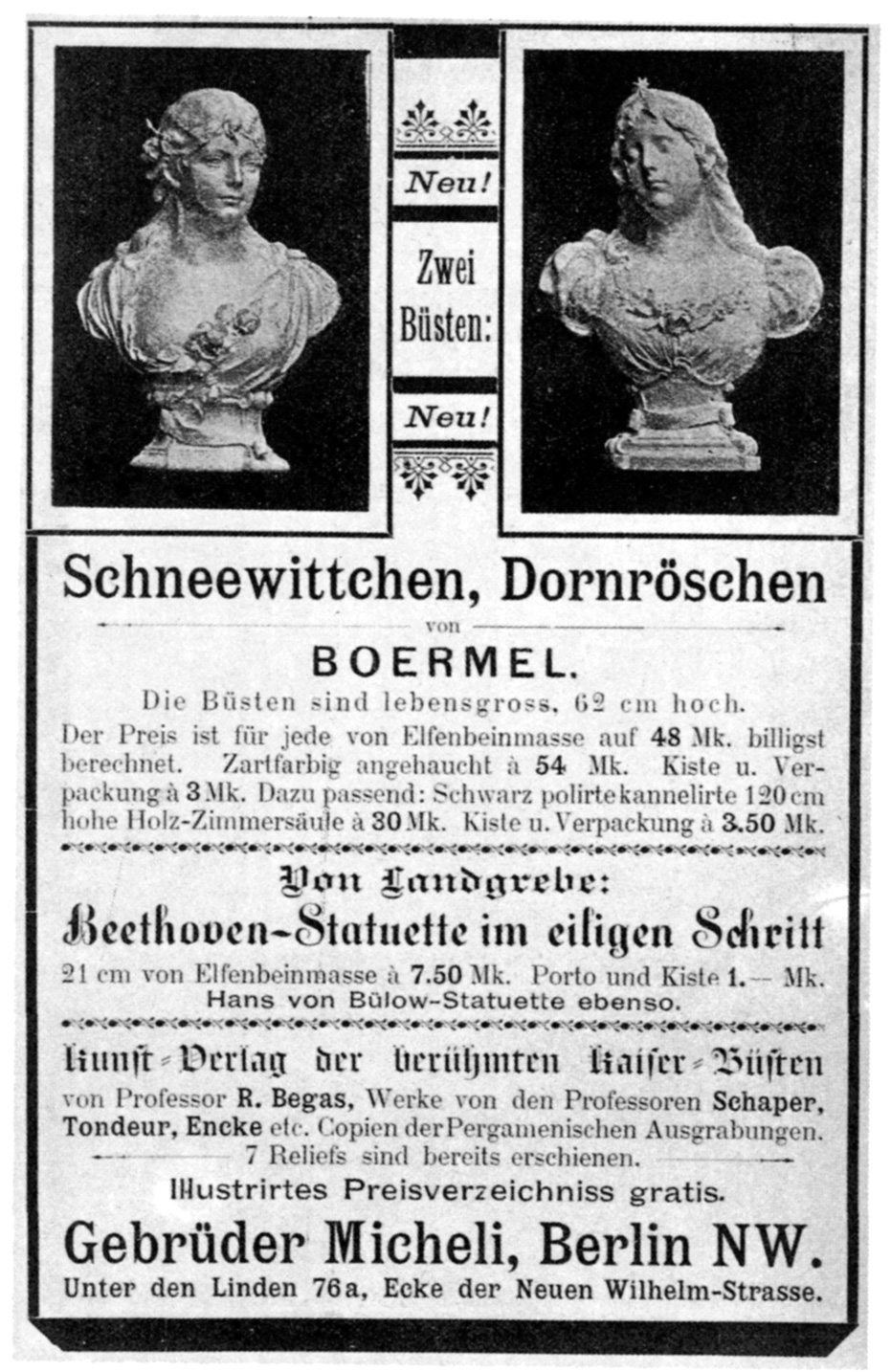 Annonce der Firma Gebrüder Michaeli, u.a. mit Reproduktionen mit Büsten von Eugen Boermel